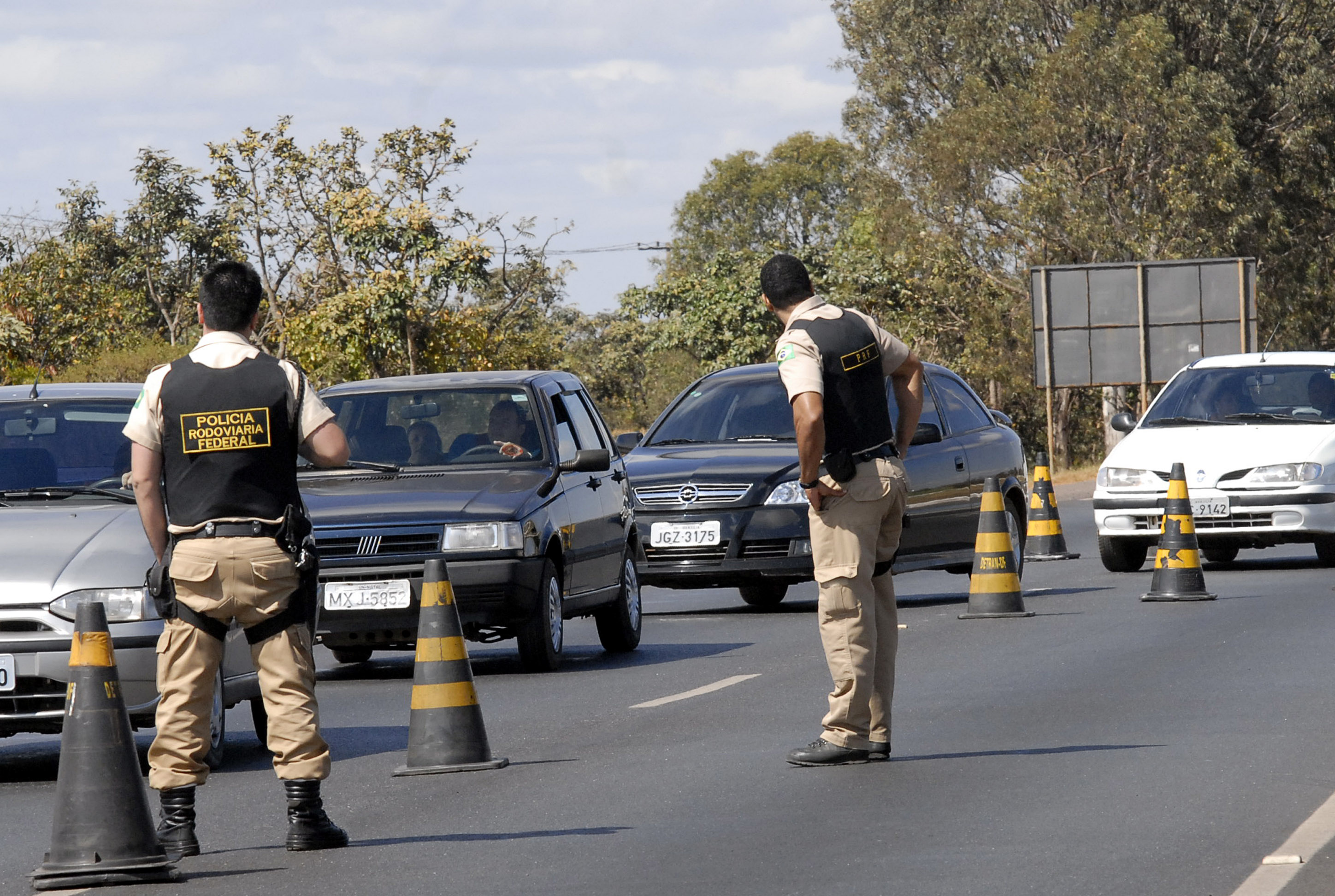 Brasília - Em função do aumento do fluxo de veículos nos principais corredores rodoviários do país, em julho, a Polícia Rodoviária Federal decidiu prorrogar até a meia-noite de terça-feira (31), a Operação Férias Escolares.